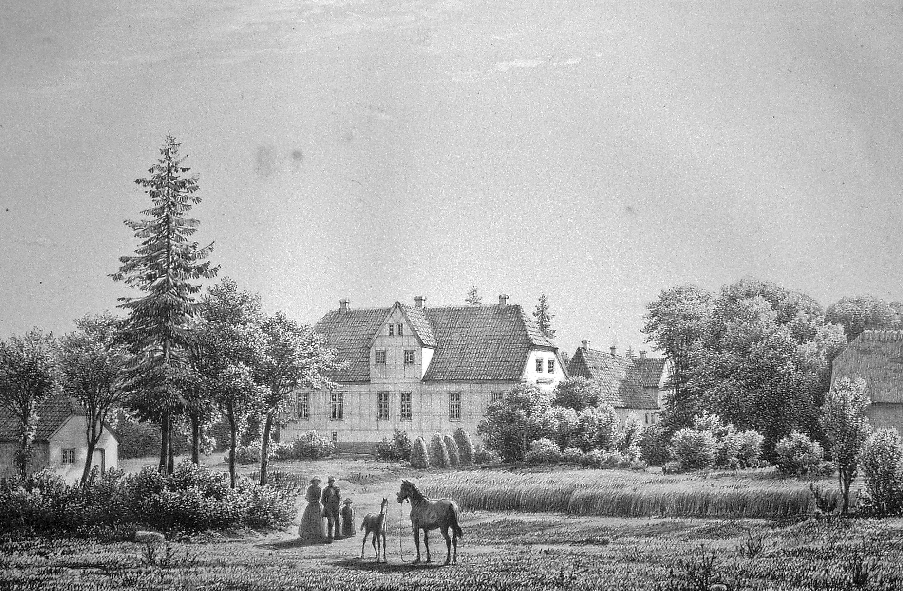 Aunsbjerg er en herregård i Sjørslev Sogn i Silkeborg Kommune. Gårdens tilliggender udgør 450 tdr. land agerjord, 50 tdr. land eng, 275 tdr. land skov og 8 huse. Hovedbygningen rummer rester af et større trefløjet anlæg fra 1500-tallet, som engang i 1700-tallet blev kraftigt reduceret.